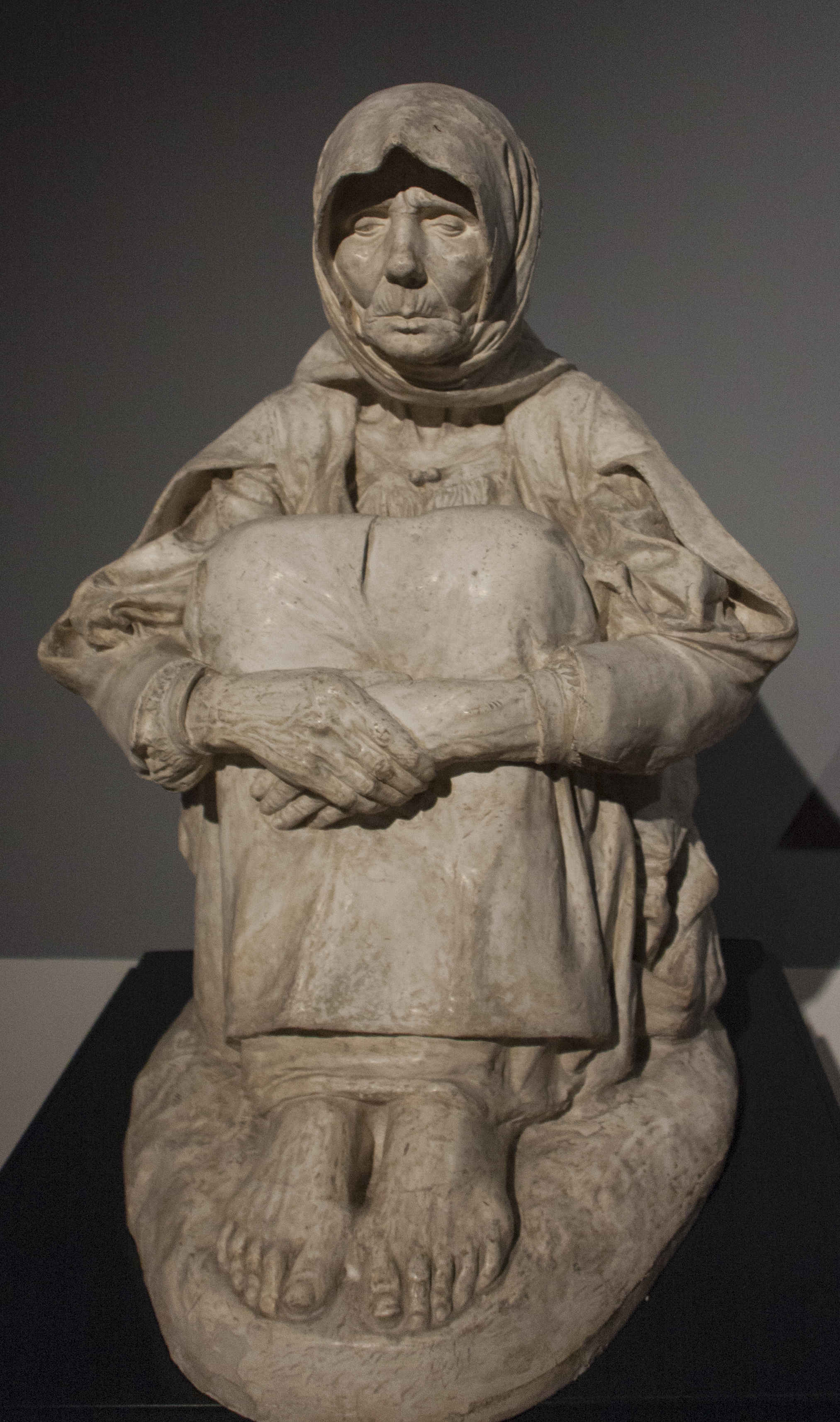 La madre dell'ucciso - Francesco Ciusa gesso 1907 acquisito alla biennale di Venezia del 1907